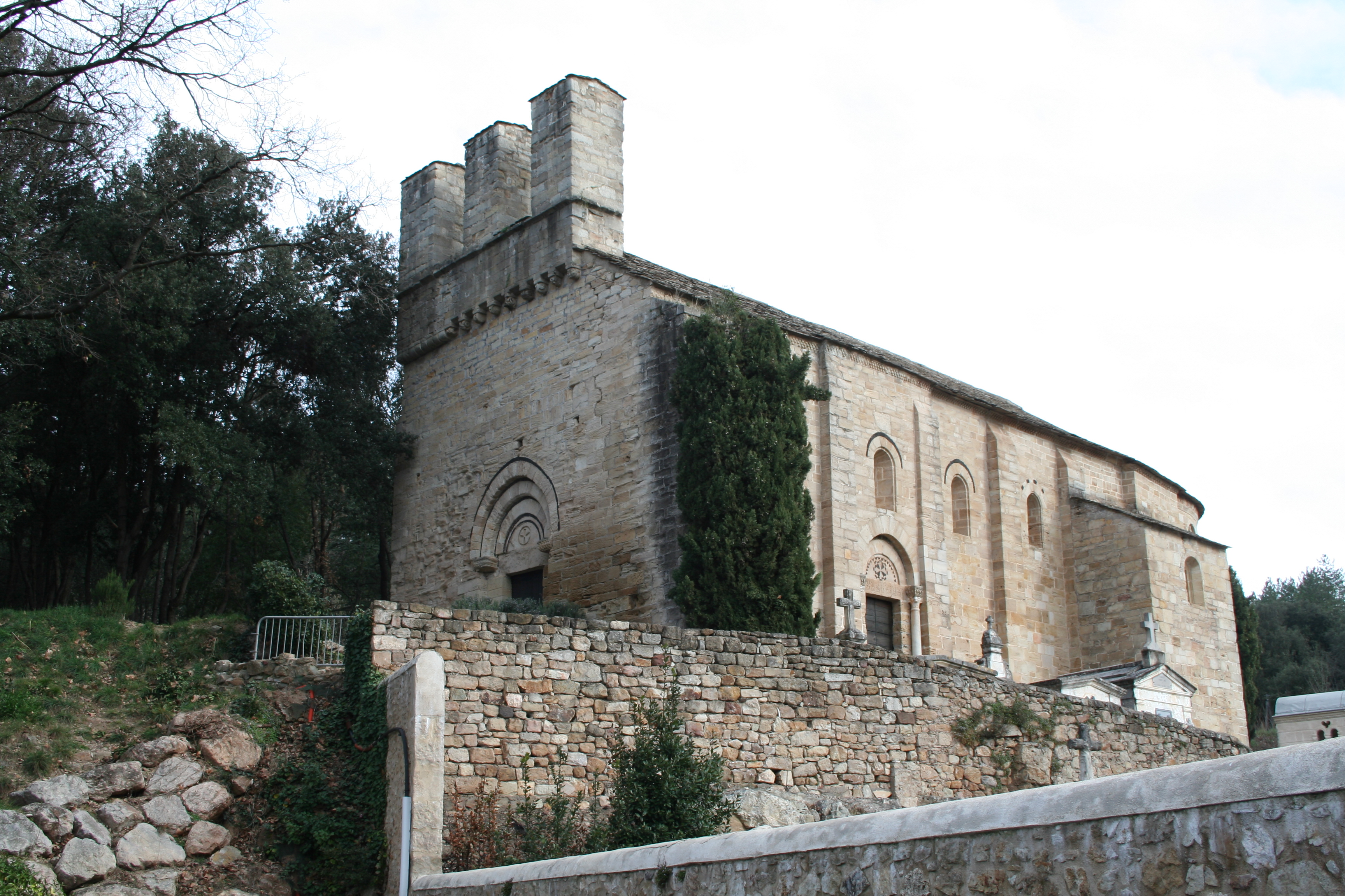 Saint-Pierre-de-Rhèdes (Lamalou-les-Bains - Hérault) - église romane - façade méridionale.